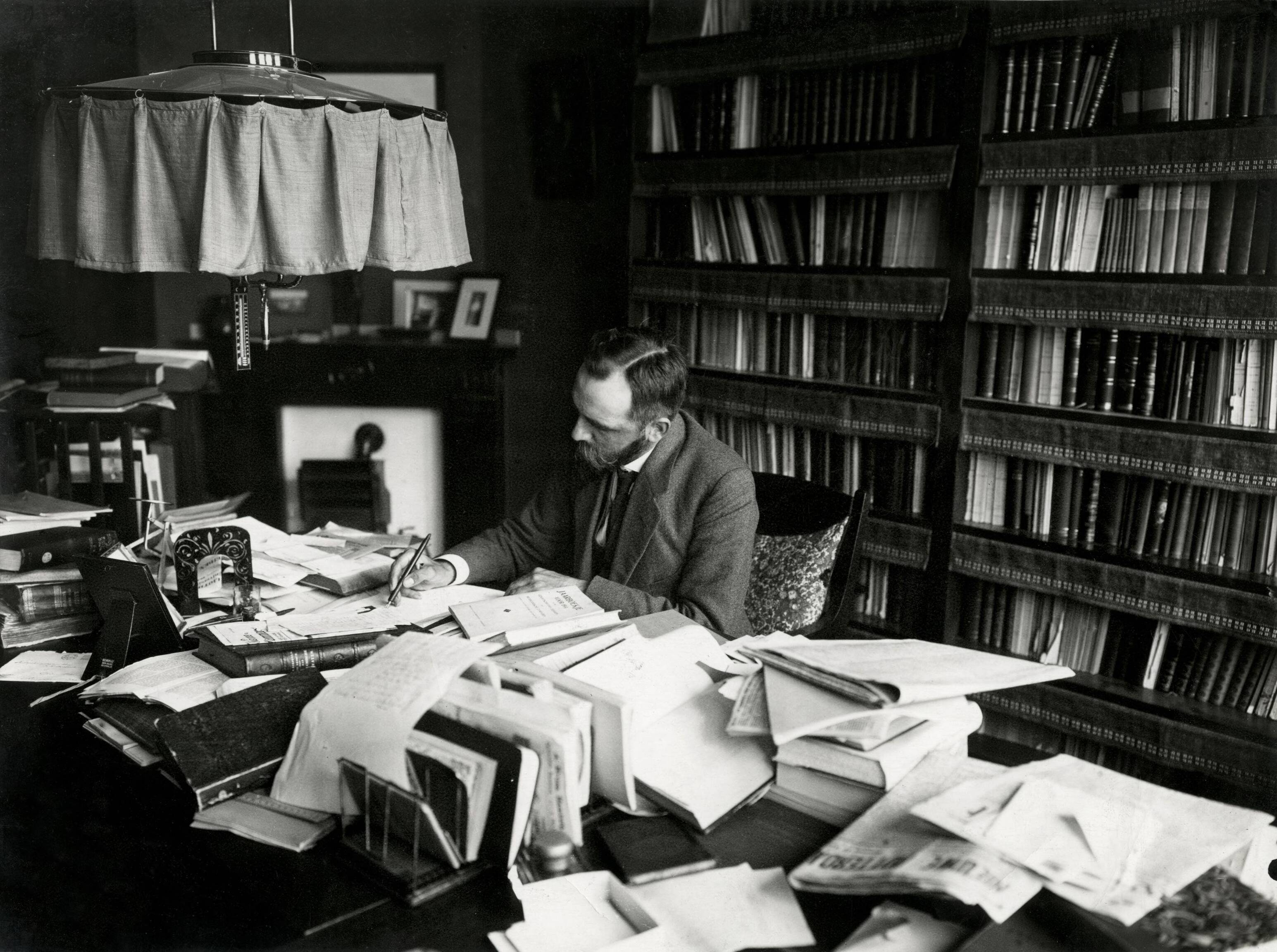 Prof. dr. H. Bolkestein in zijn studeerkamer. In 1915 benoemd tot hoogleraar Oude Geschiedenis in Utrecht. [1915].